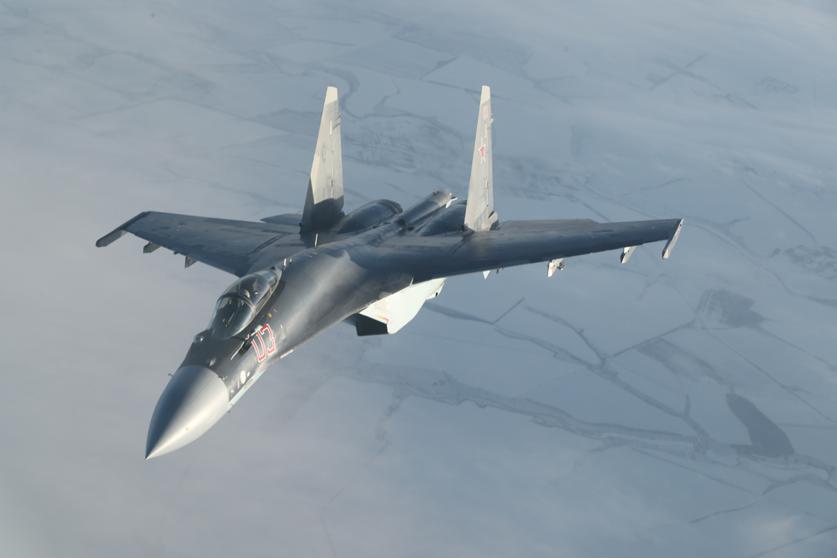 Отработка дозаправки Су-35С в воздухе летчиками Липецкого авиацентра.